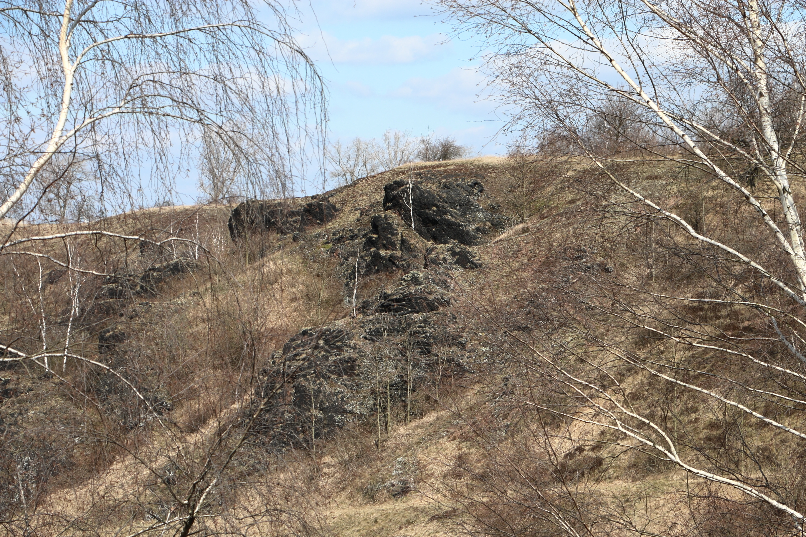 Freiliegendes Porphyrgestein im Naturschutzgebiet „Porphyrlandschaft bei Brachwitz“ in Sachsen-Anhalt.